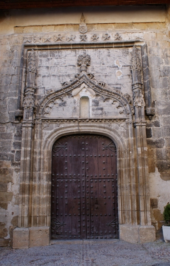 Pórtico de la Iglesia Parroquial de San Juan Bautista, Auñón, Guadalajara: estilo plateresco, claro ejemplo del gótico tardío.